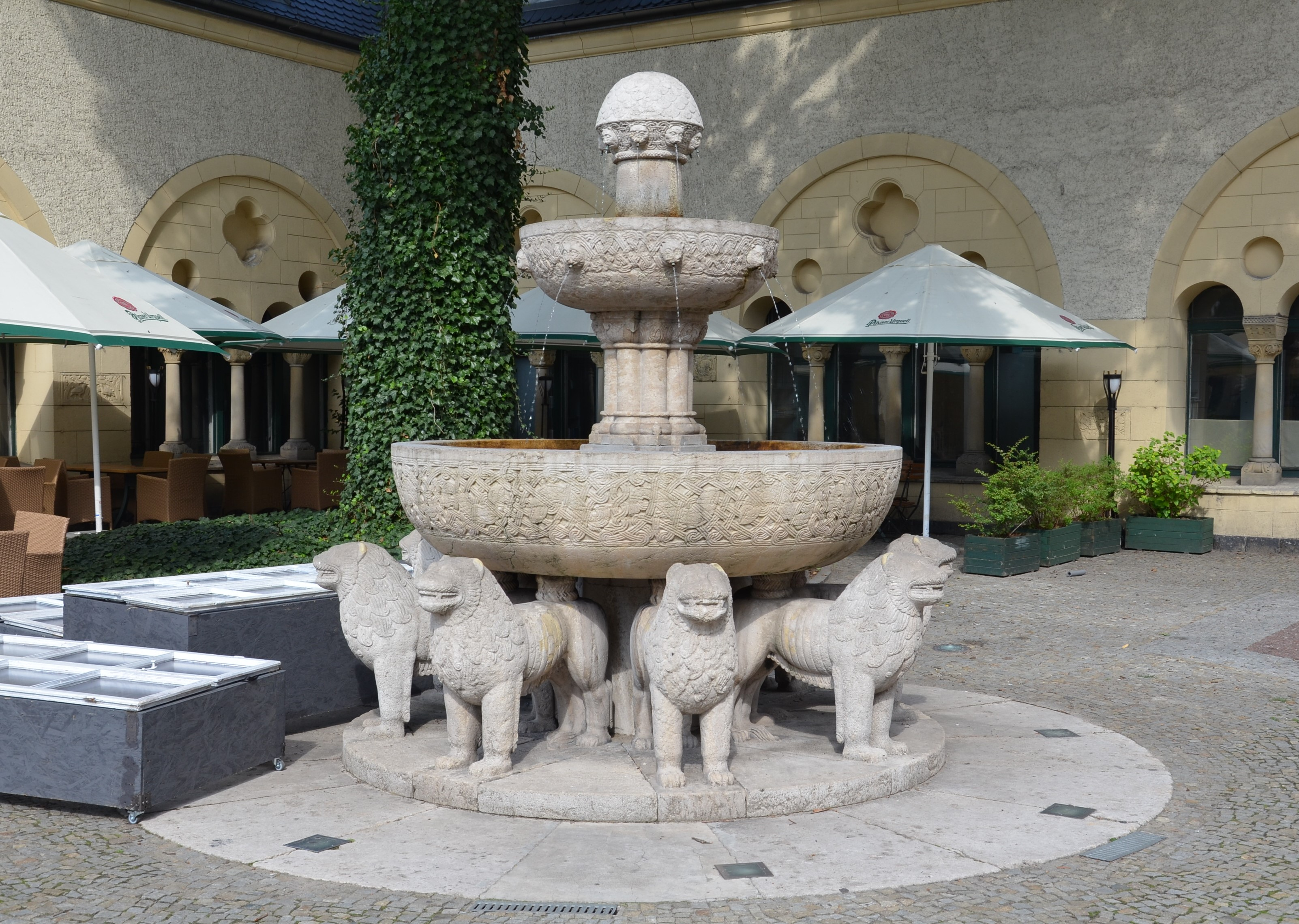 Poznań, nowy zamek, ob. centrum kultury, 1905-1945